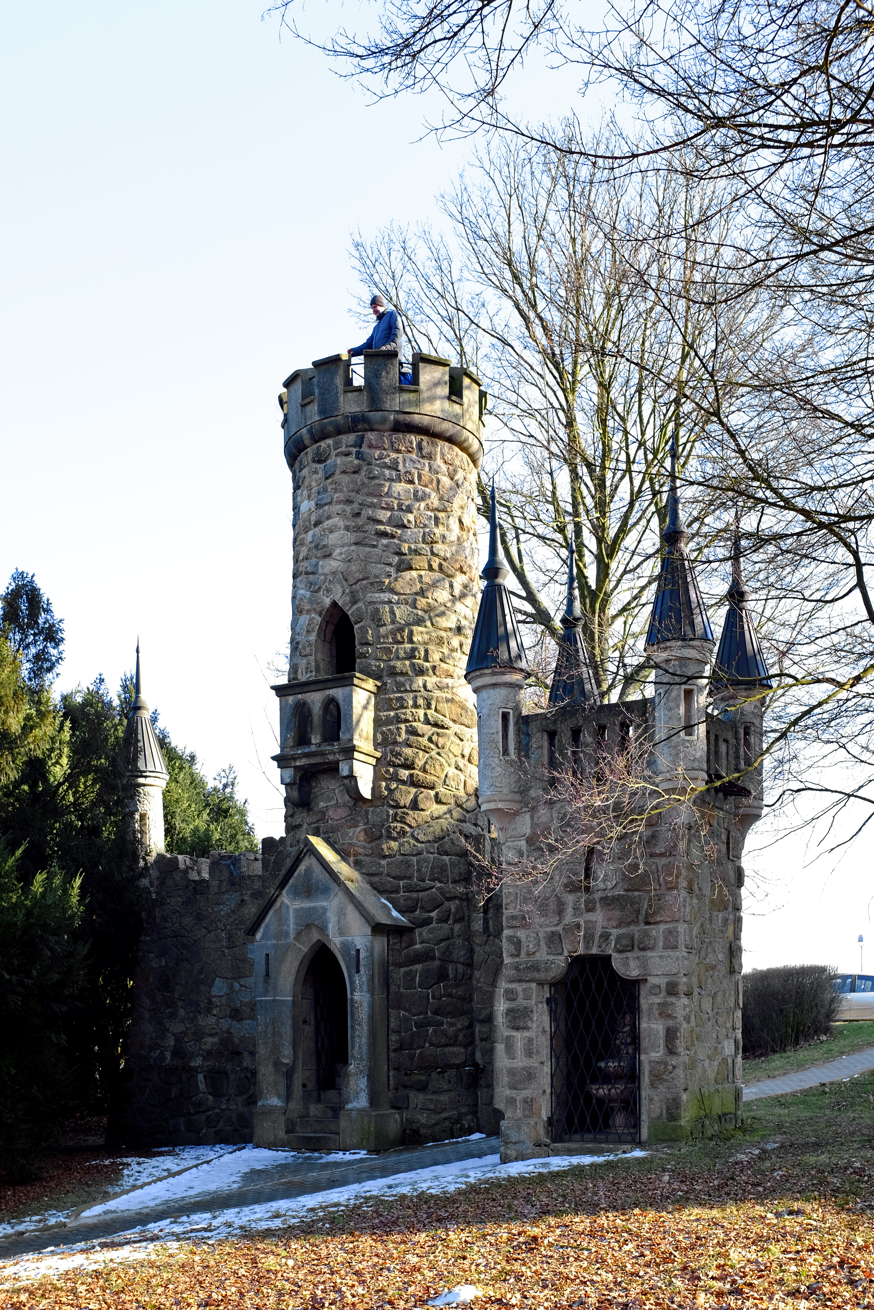 Rozhledna Salingburg, Franiškovy Lázně